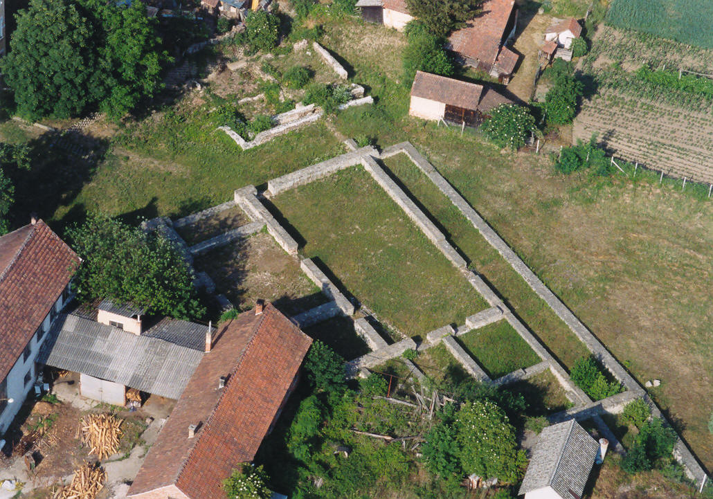 Zalalövő,Hungary, aerialphotography